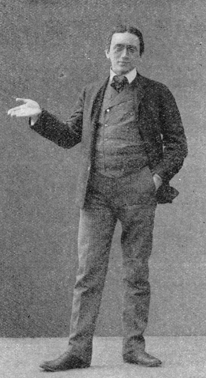 Ernst Norée (1878-1936)